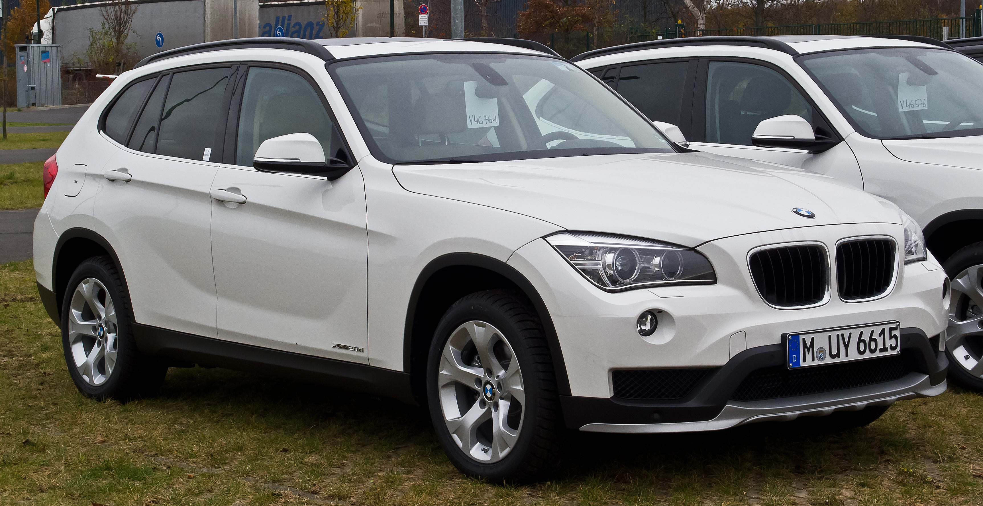 BMW X1 xDrive20d (E84, 2. Facelift)